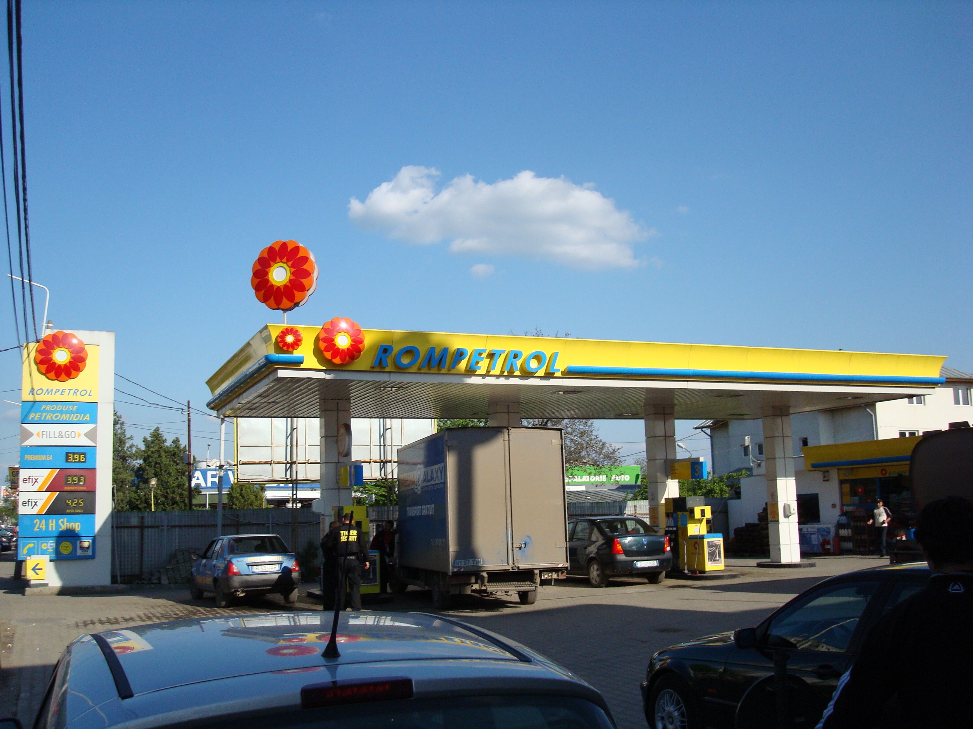 Die ROMPETROL Tankstelle in der Luica Straße in Bukarest